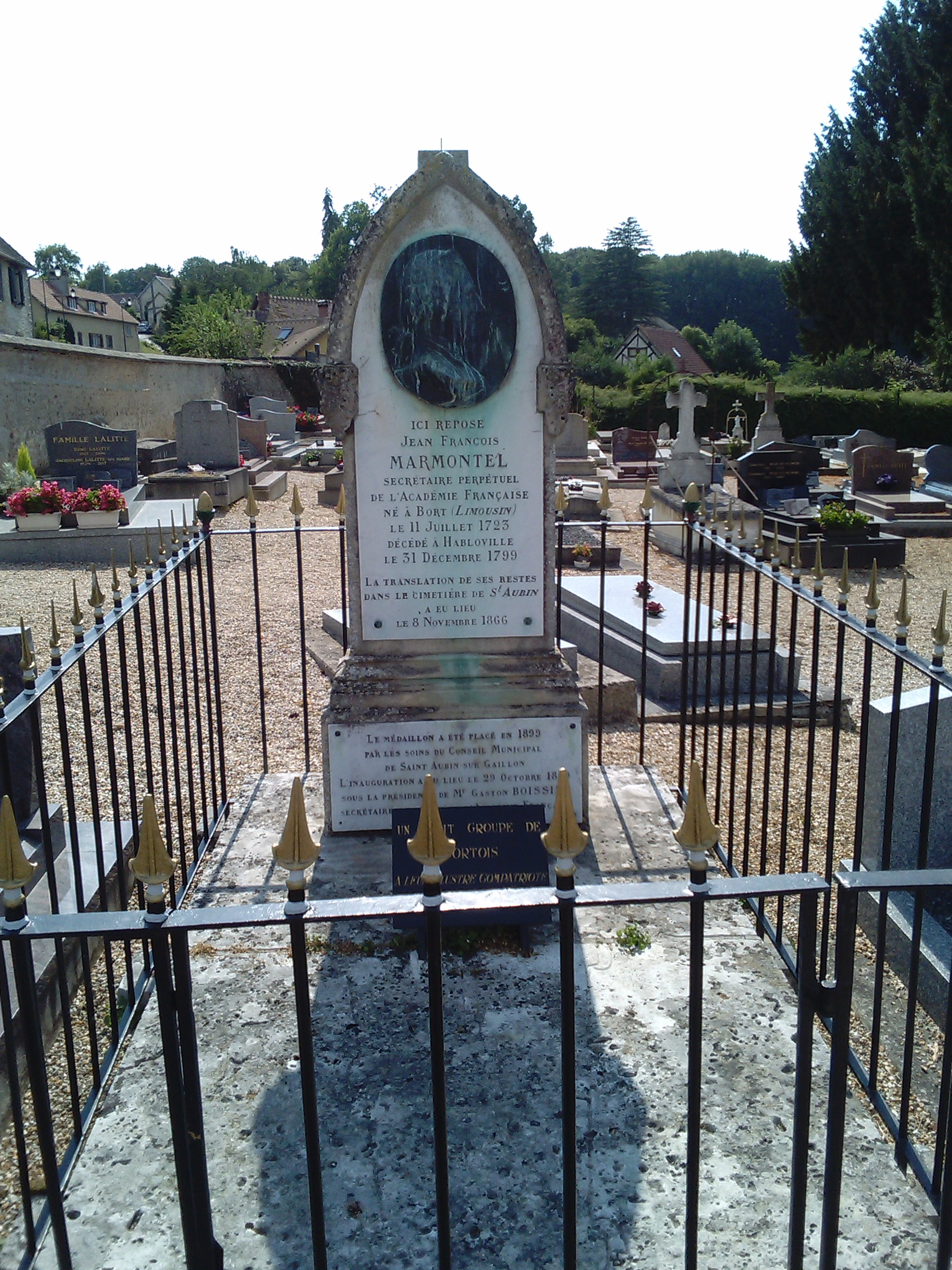 Visite de Saint-Aubin-sur-Gaillon - Eure - été 2018.